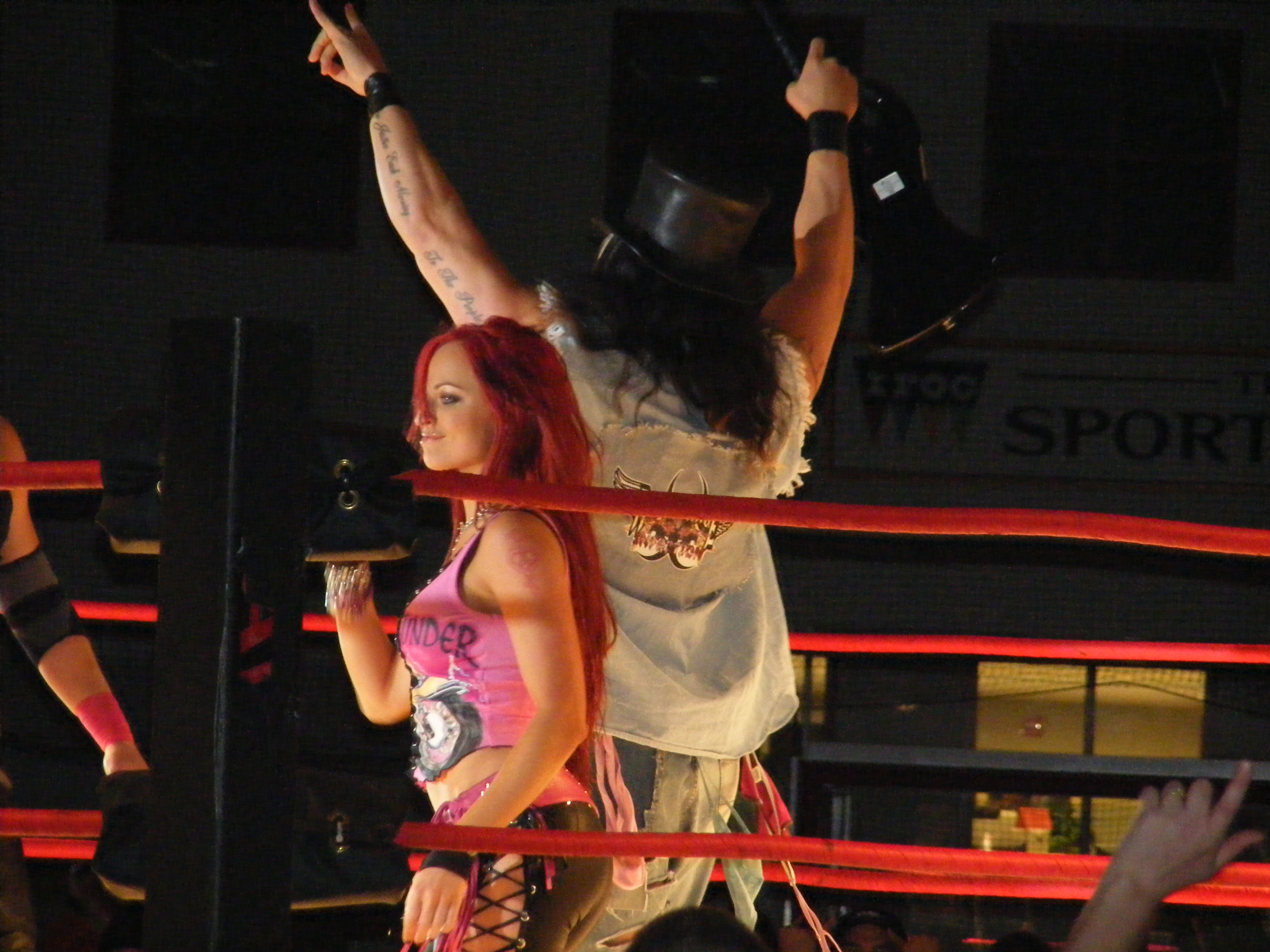 Hemme junto a Lance Hoyt en Impact.